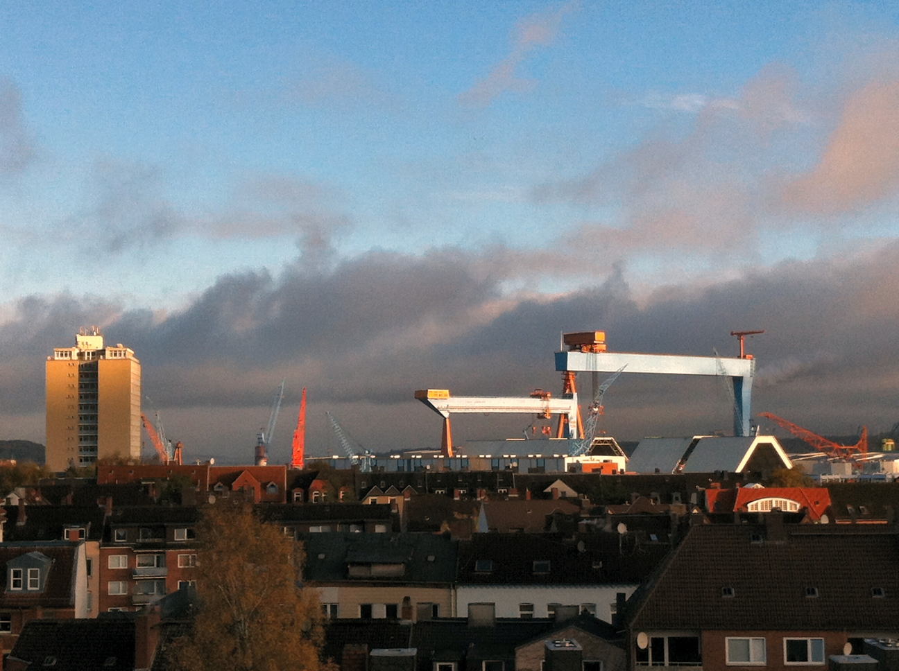 Blick über den Kieler Stadtteil Gaarden mit Werft im Hintergrund